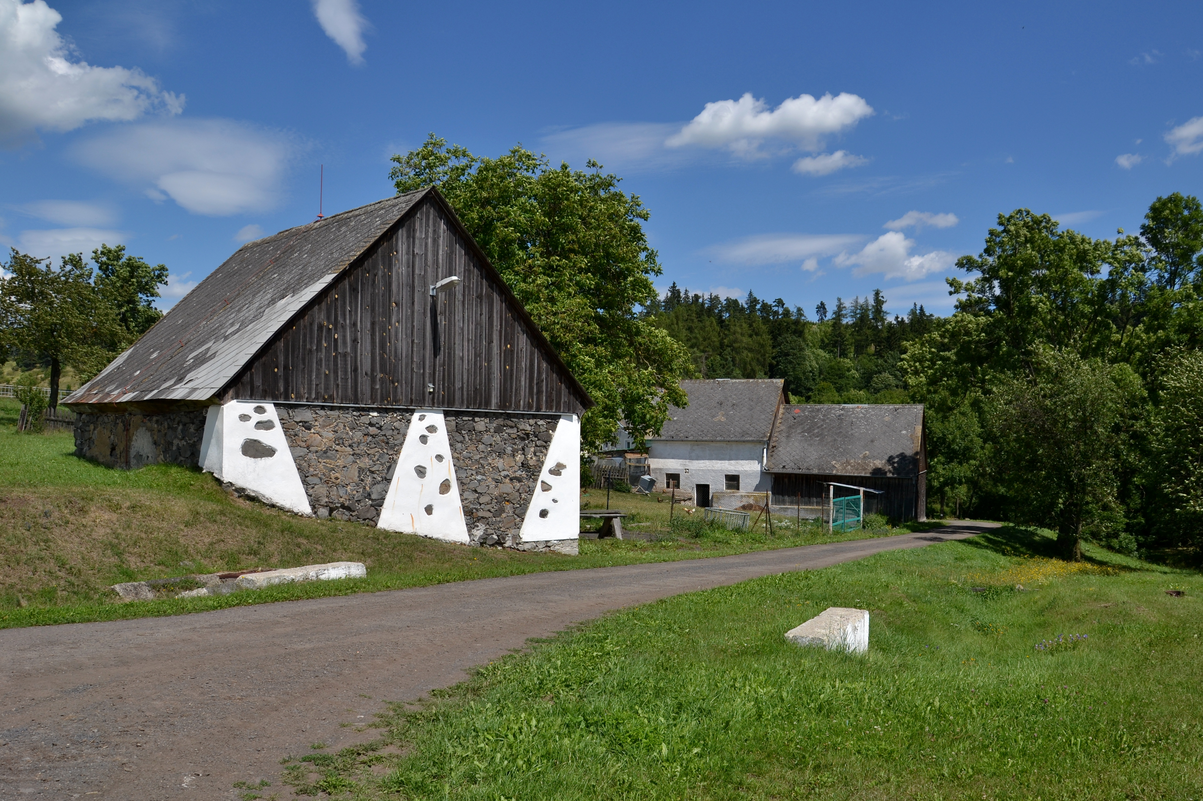 Malý Hlavákov – usedlost čp. 15